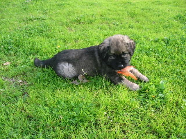 Cão da Serra da Estrela novo